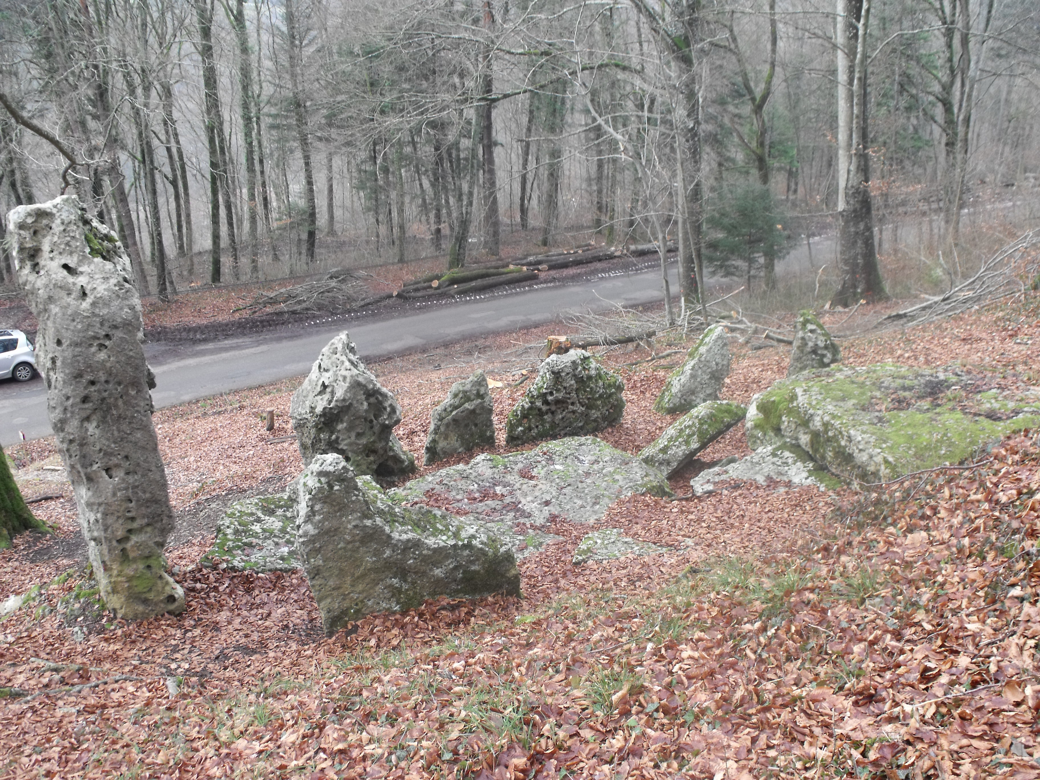 Cromlech des Fourneaux - Hérimoncourt - Doubs, France